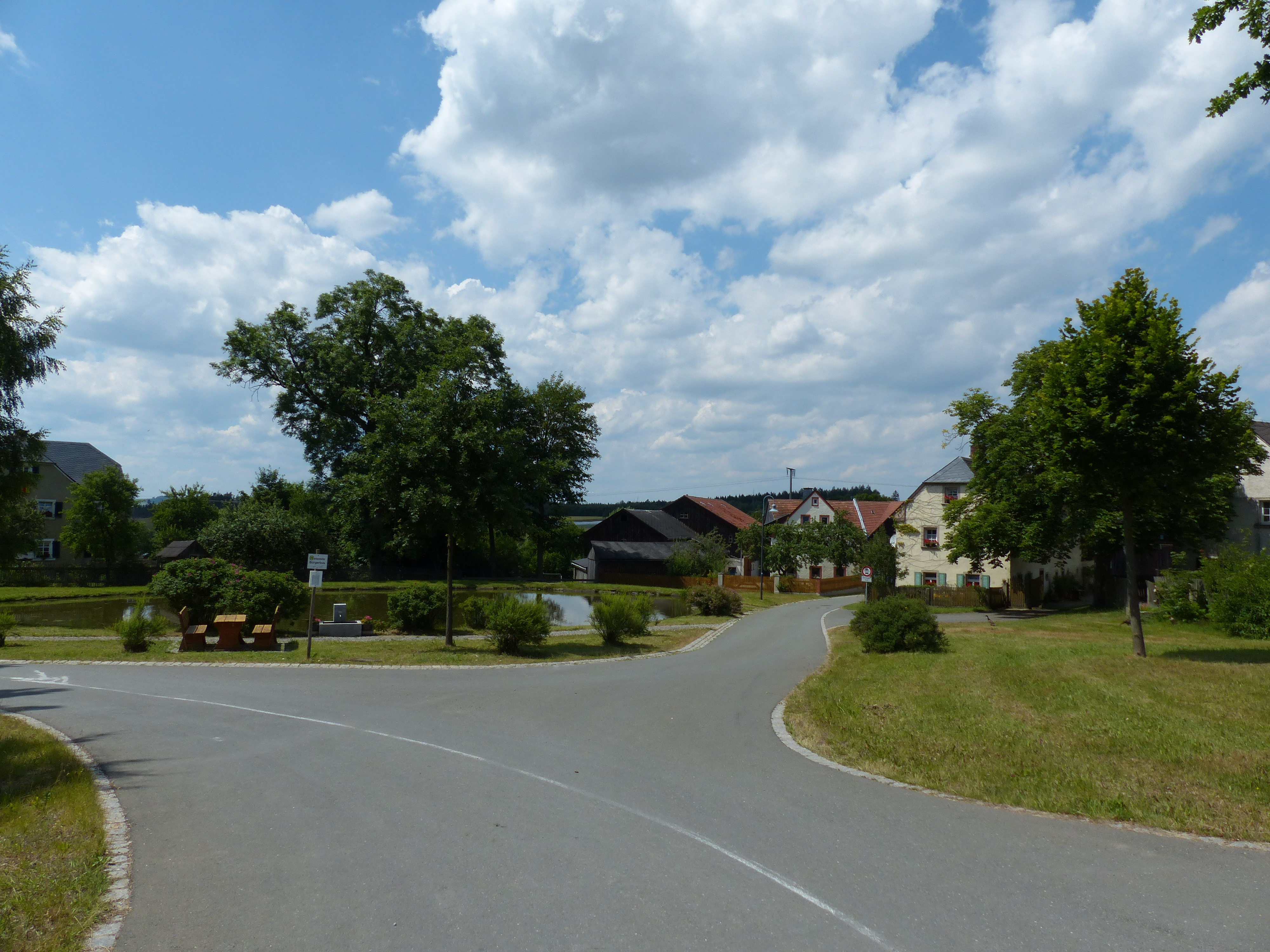 Ansicht von Quellenreuth, Ortsteil von Schwarzenbach an der Saale